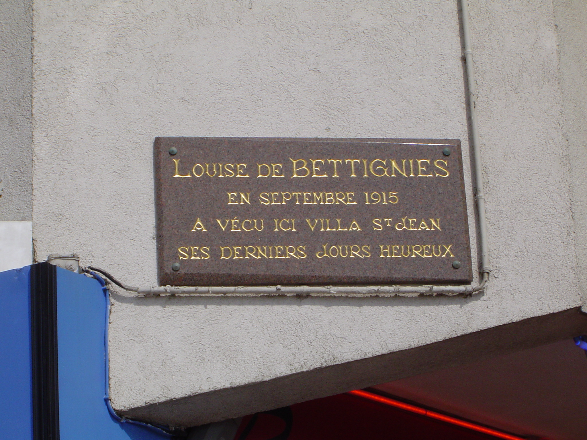 Photos prises dans la commune du Touquet-Paris-Plage